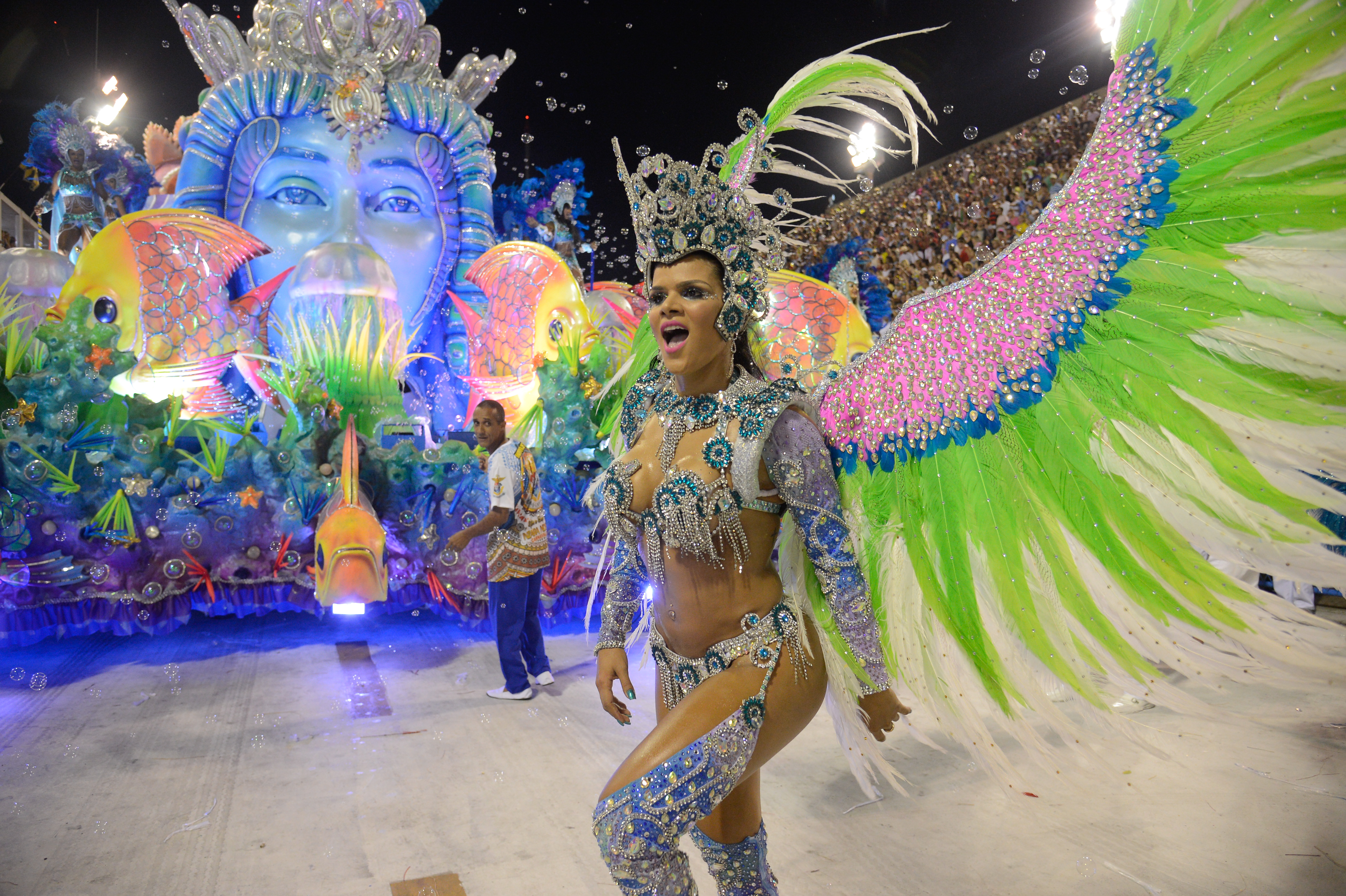 Rio de Janeiro - Desfile da escola de samba União da Ilha do Governador, pelo grupo especial, no Sambódromo (Fernando Frazão/Agência Brasil)